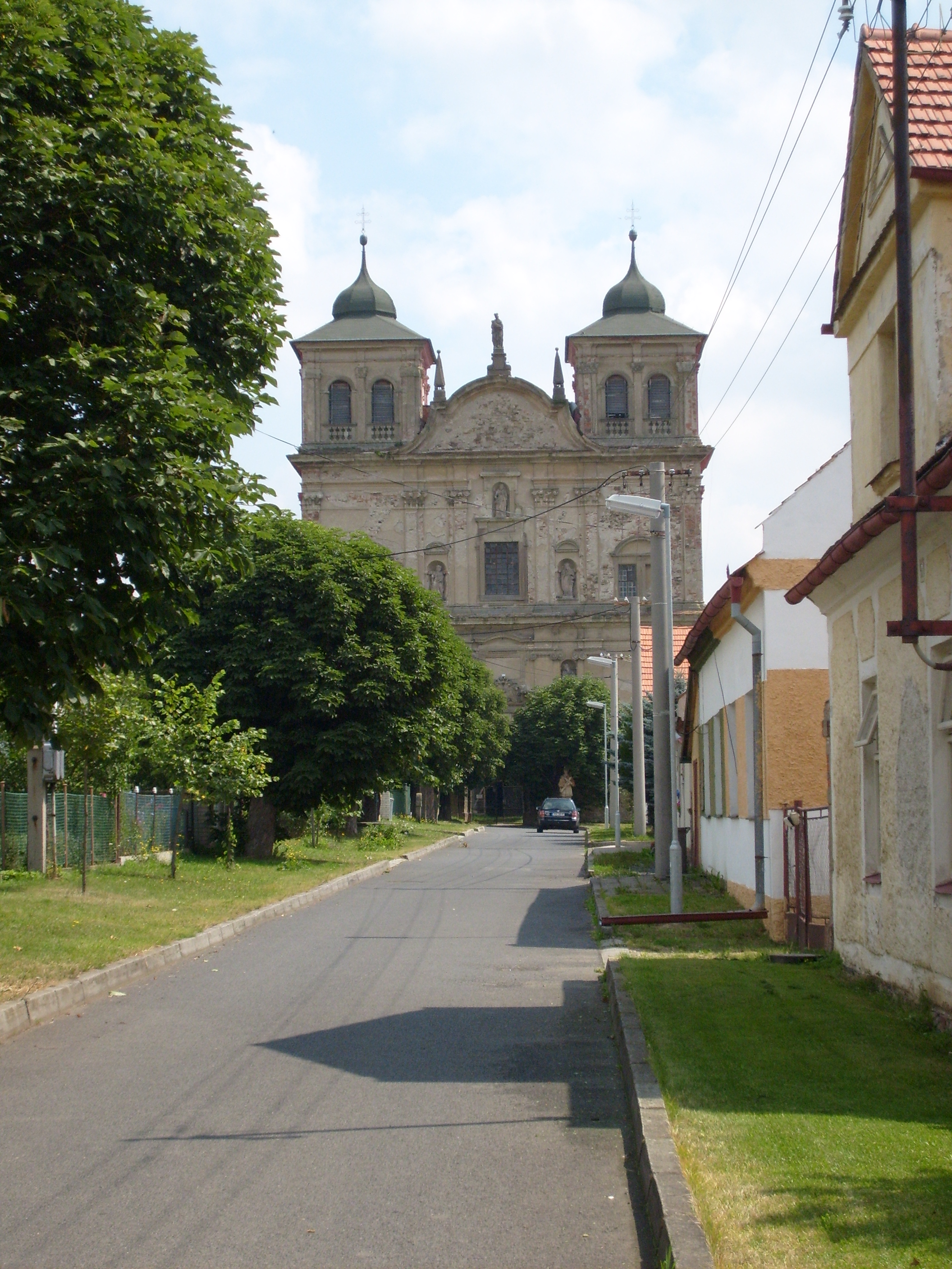 Kostel Povýšení sv. Kříže, Chyše, Karlovy Vary Region, Czech Republic